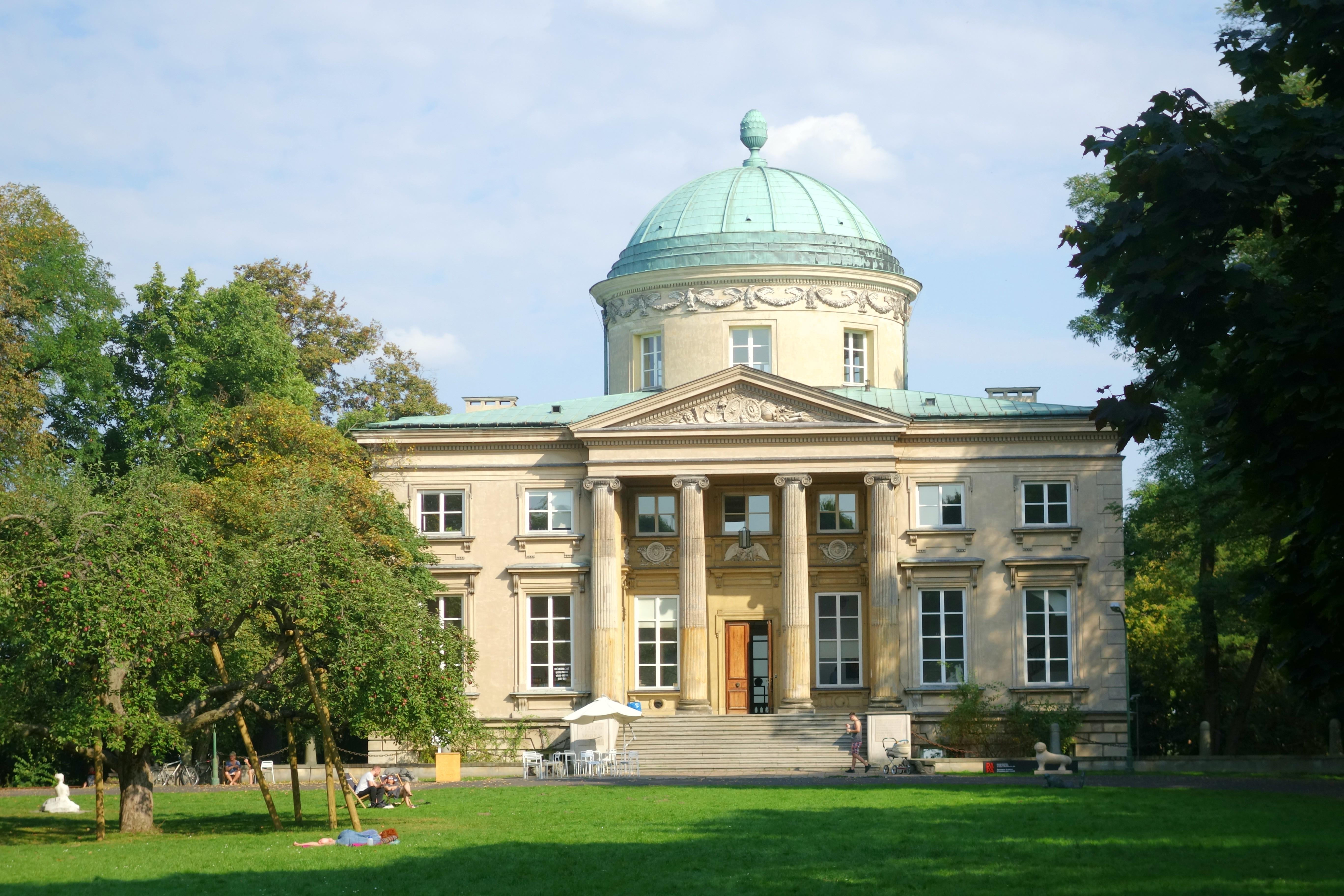 Pałac Królikarnia - widok od frontu